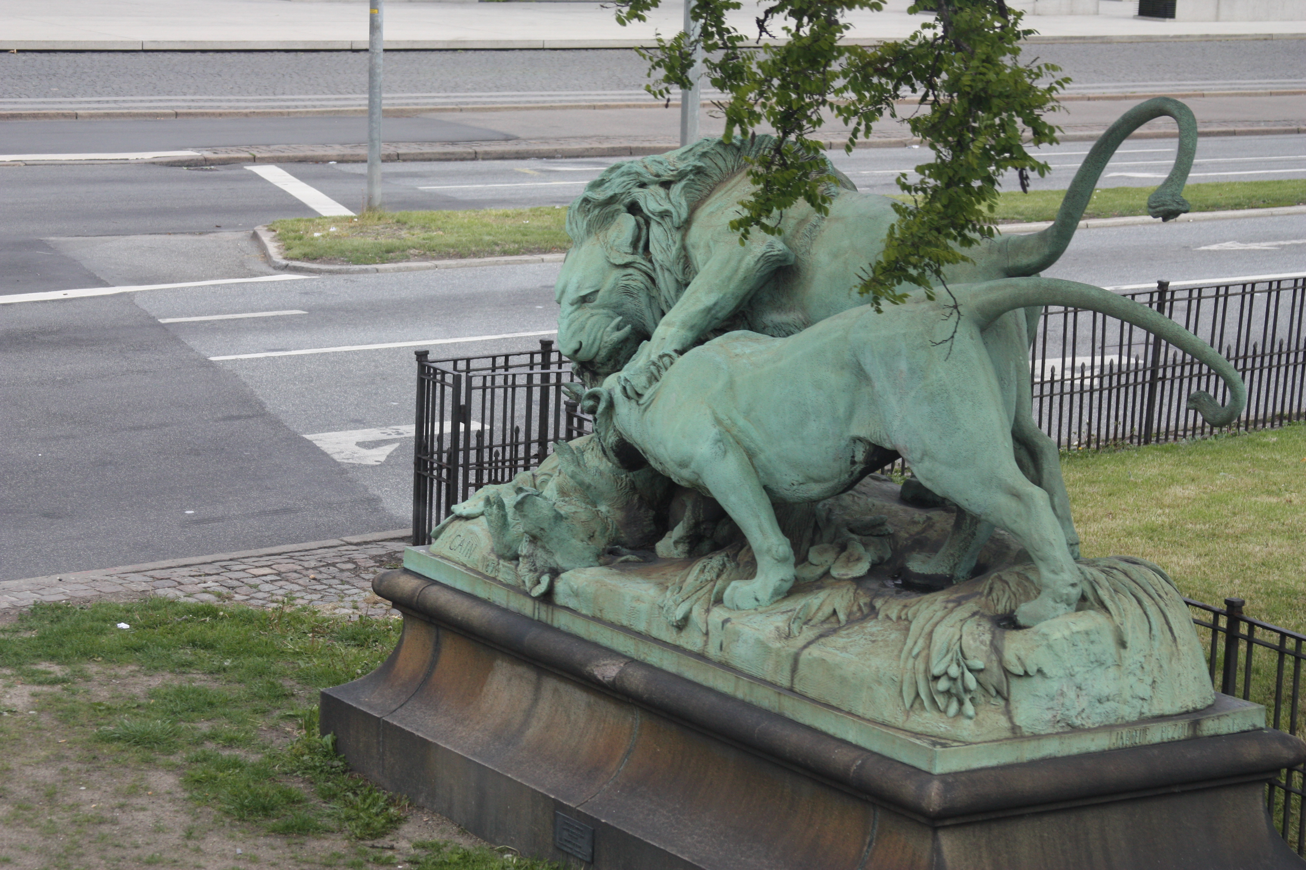 Kopenhagen 2009